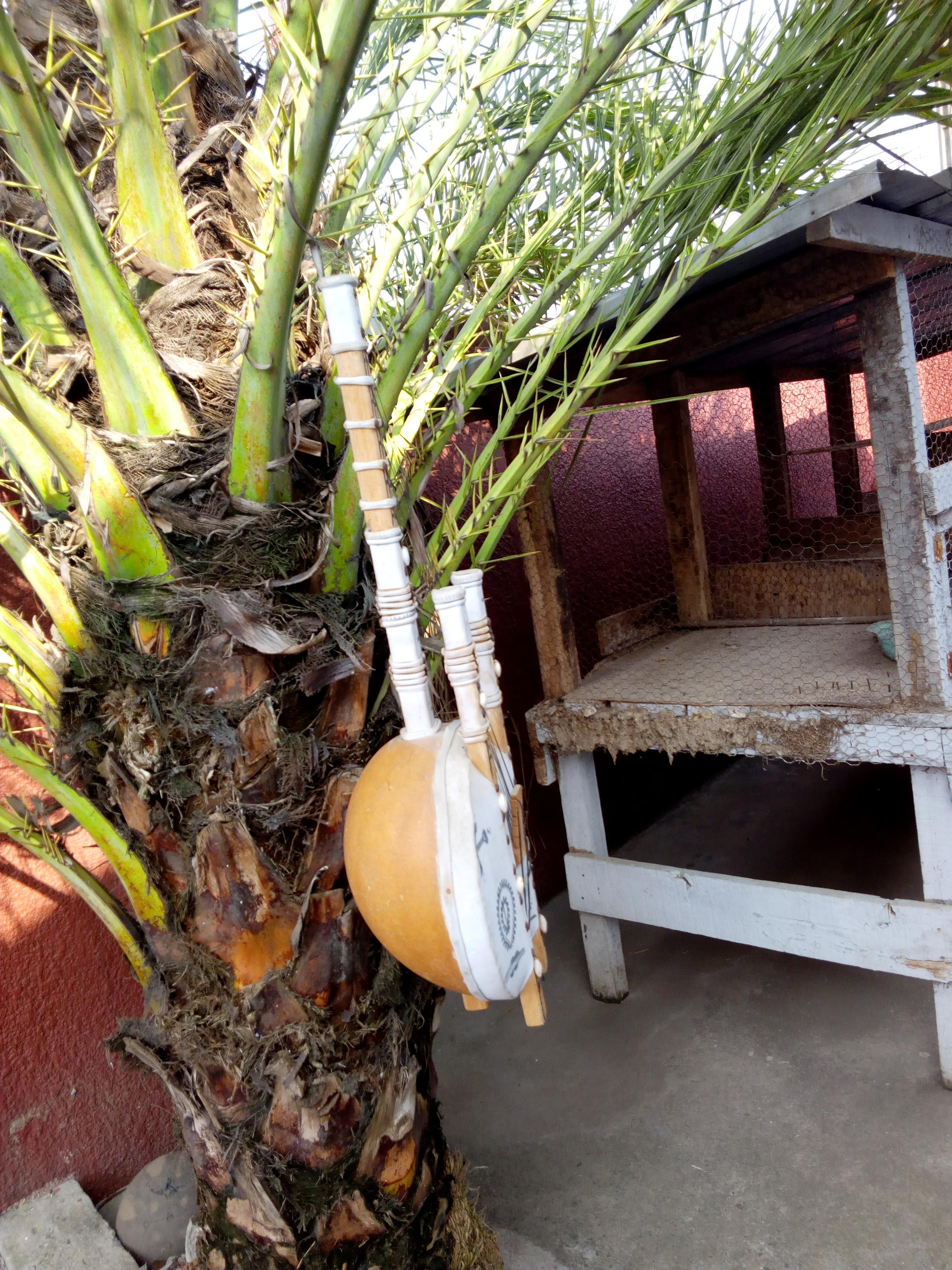 la kora est l’instrument de musique par excellence des musiciens professionnels mandingues (appelés griots ) et est aussi utilisé par les dozo, chasseur traditionnel situé au nord de la cote d'ivoire. This is an image from Ivory Coast